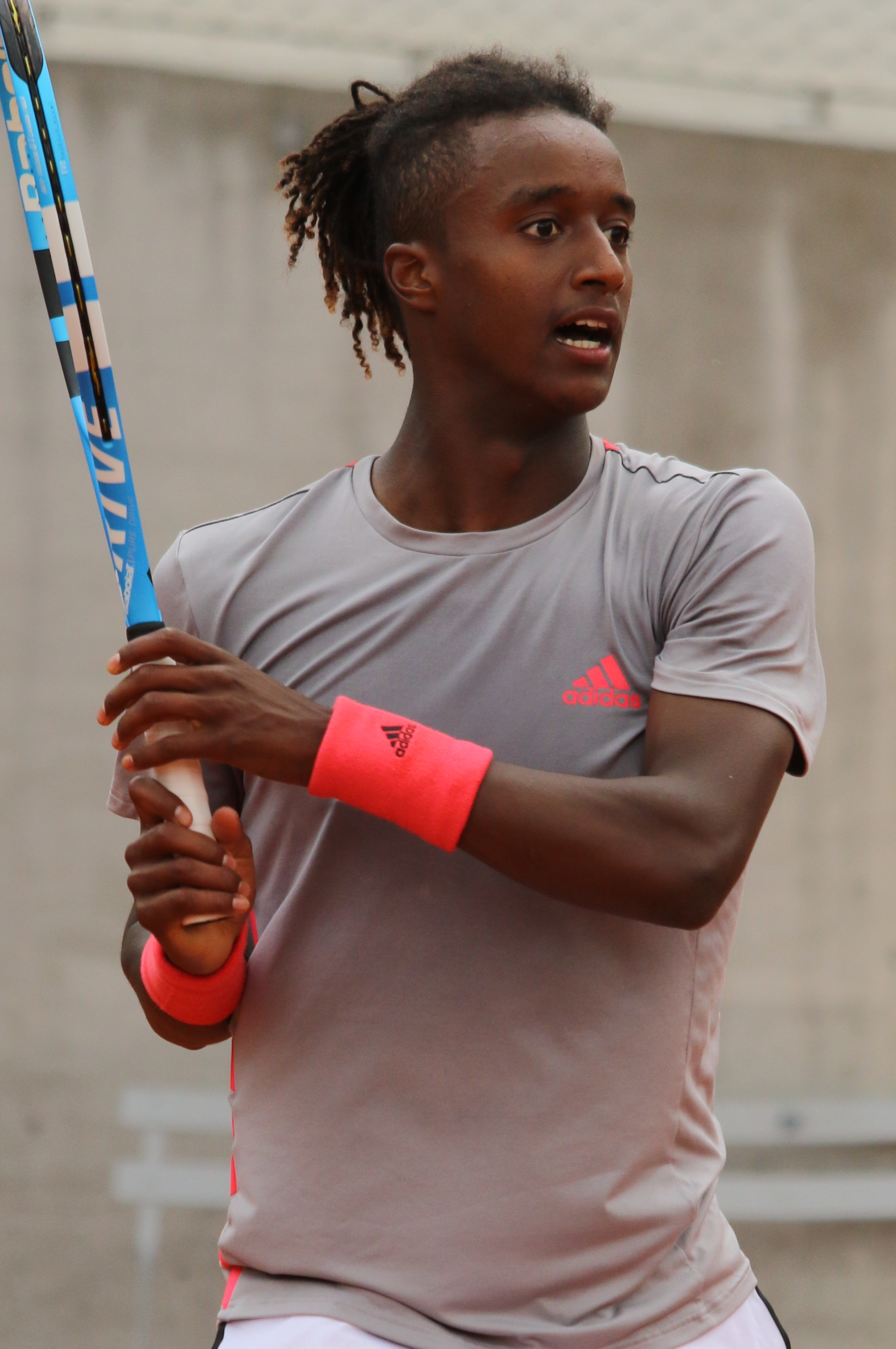 Ymer M. RGQ19 (21)